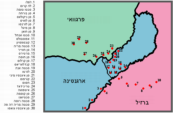 Reducciones SA